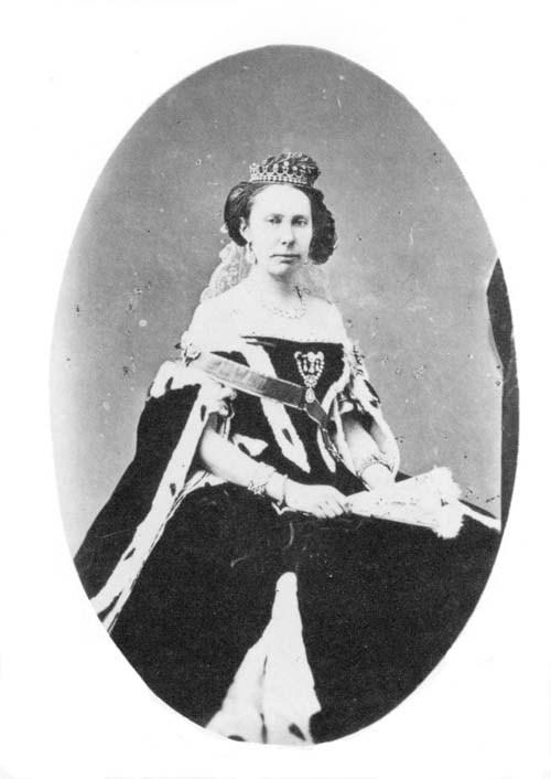 Foto van koningin Lovisa van Zweden (overleden 1871). Auteursrecht verlopen. Afbeelding komt in meerdere publicaties voor. Deze versie gevonden op alwaar het zonder auteursrechten gekopieerd mag worden.